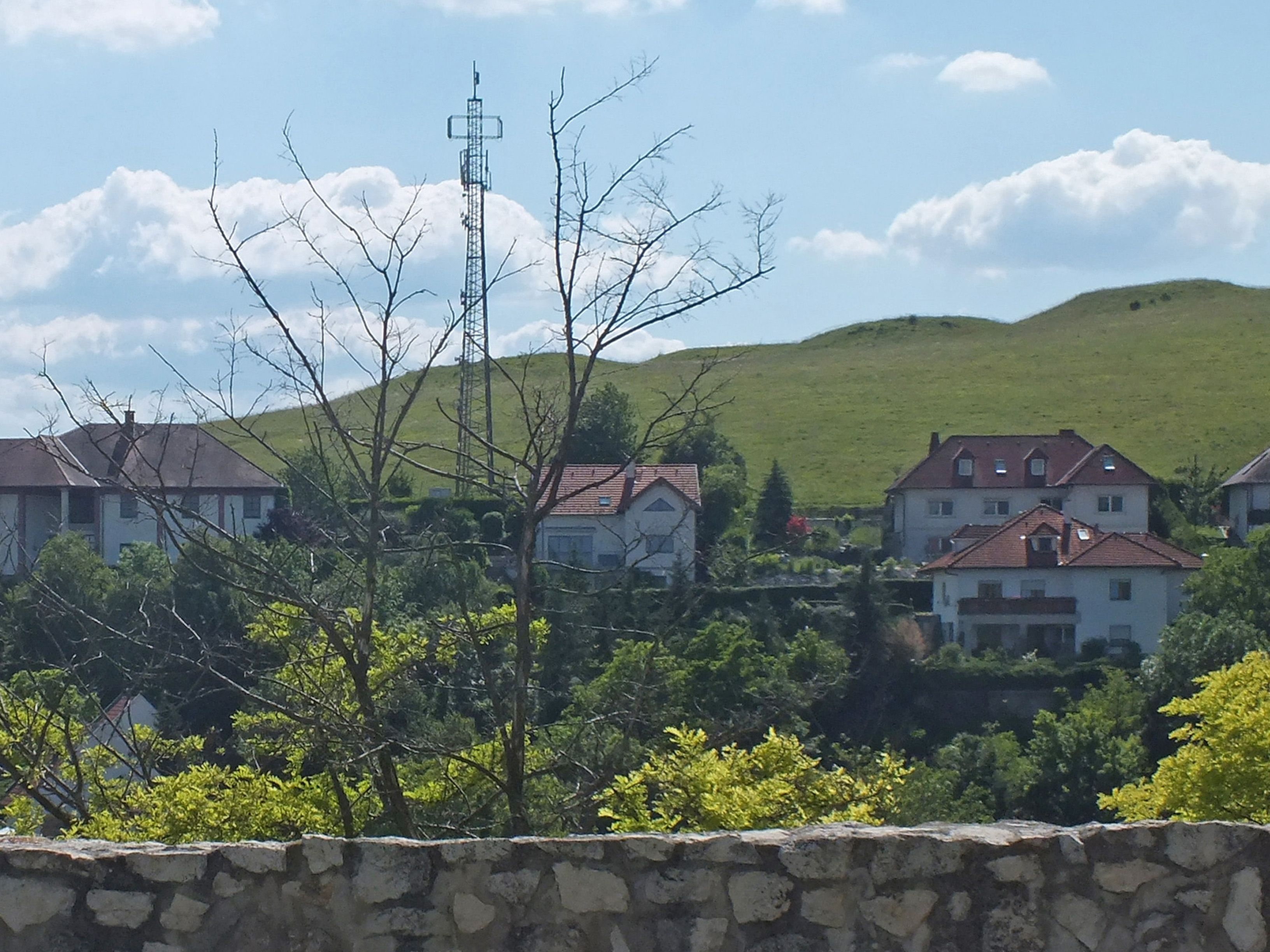 Keltengräberhügel oberhalb von Donnerskirchen im Burgenland